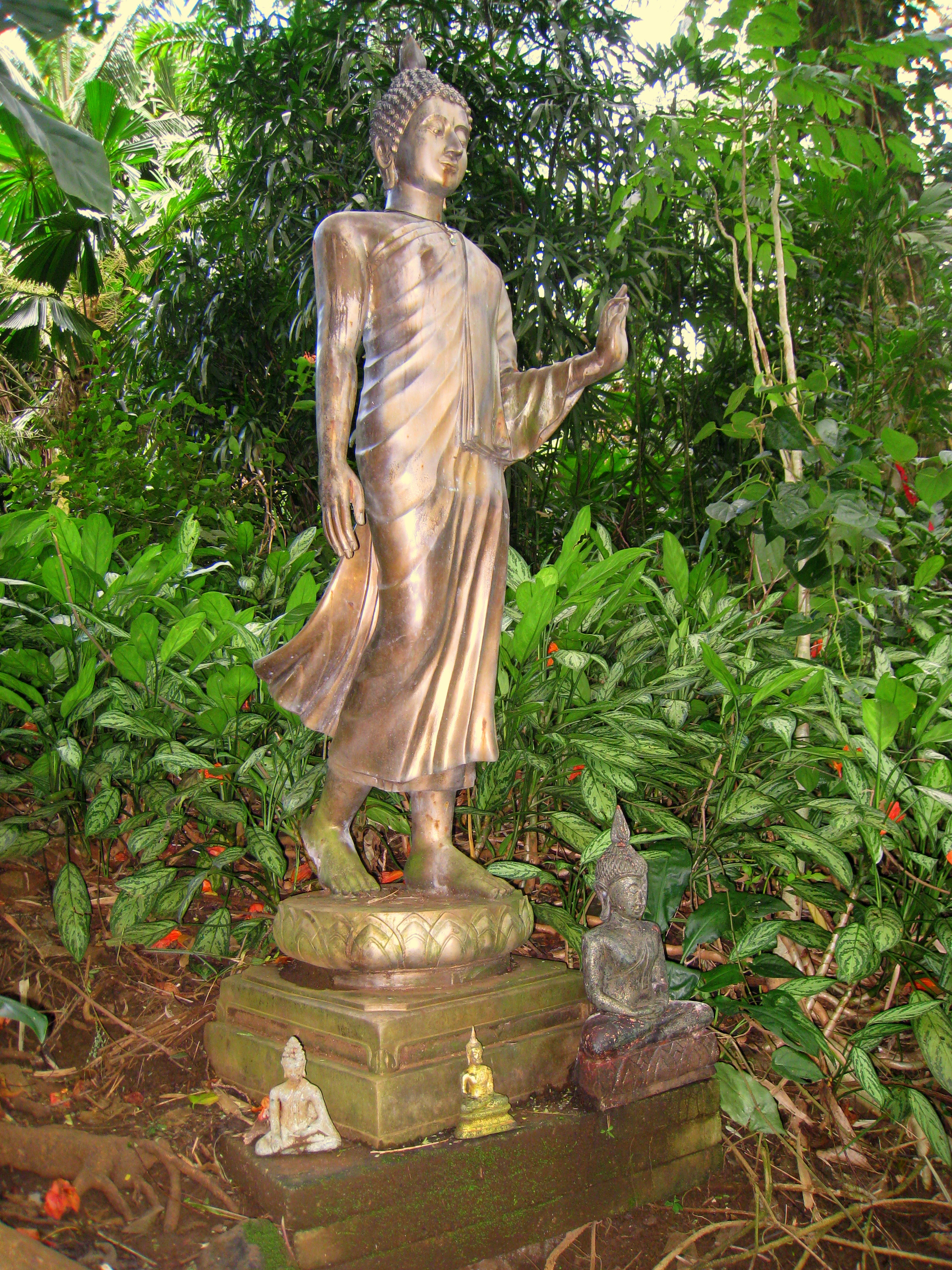 Lyon Arboretum, Oahu, Hawaii, USA - statue.